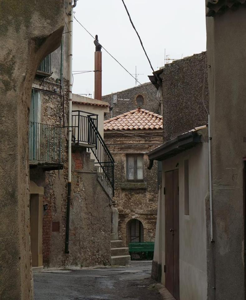 Uno scorcio del centro storico di Cropani (CZ)